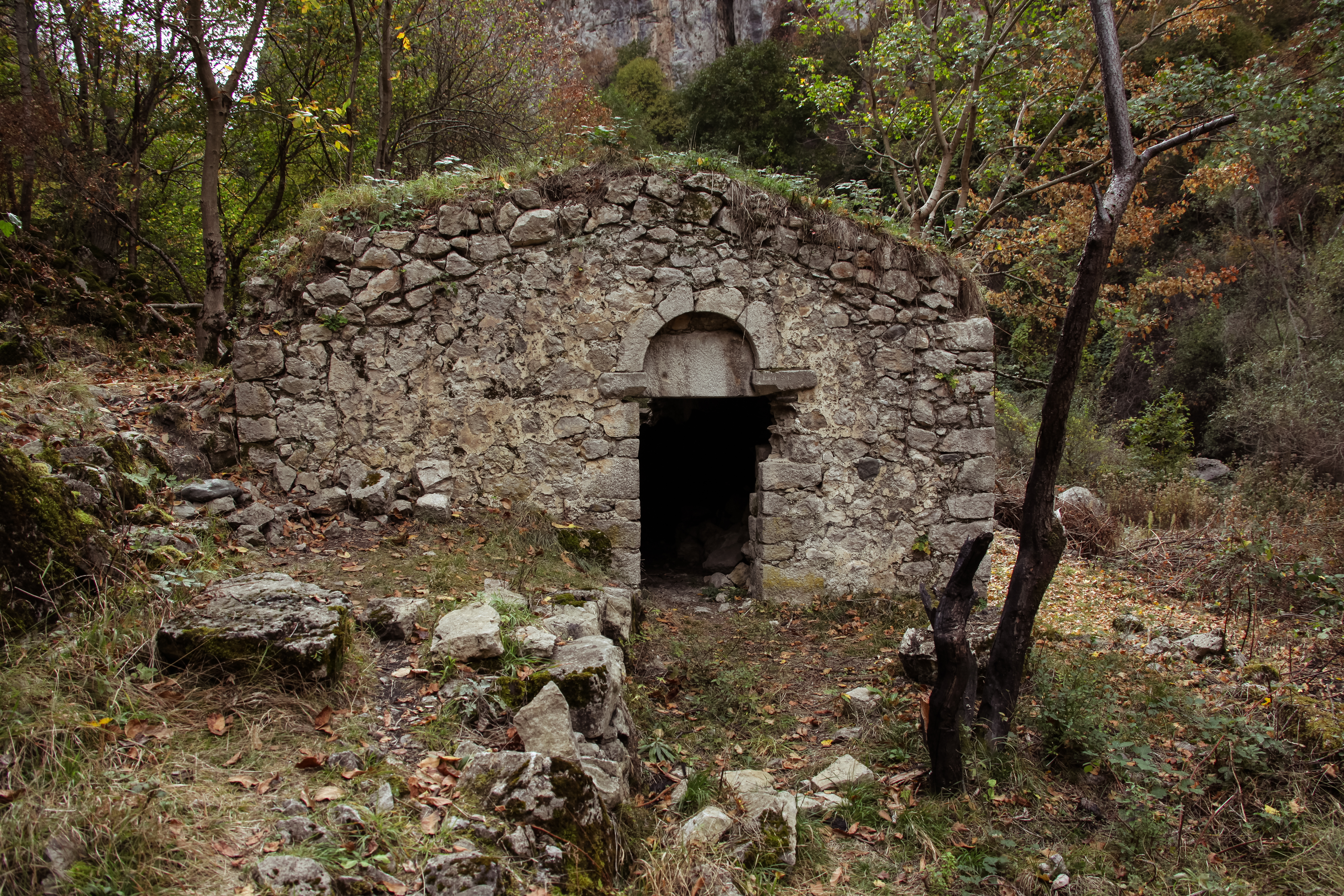 Հունոտի ջրաղացներ